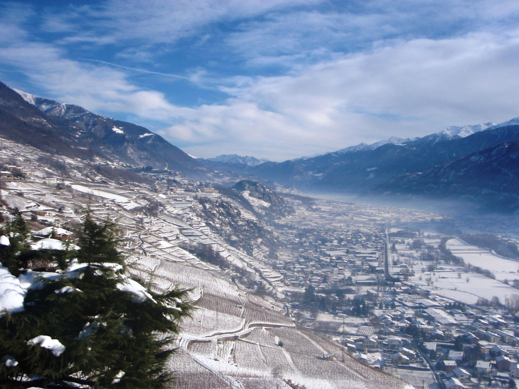 Vista da Castel Grumello verso est